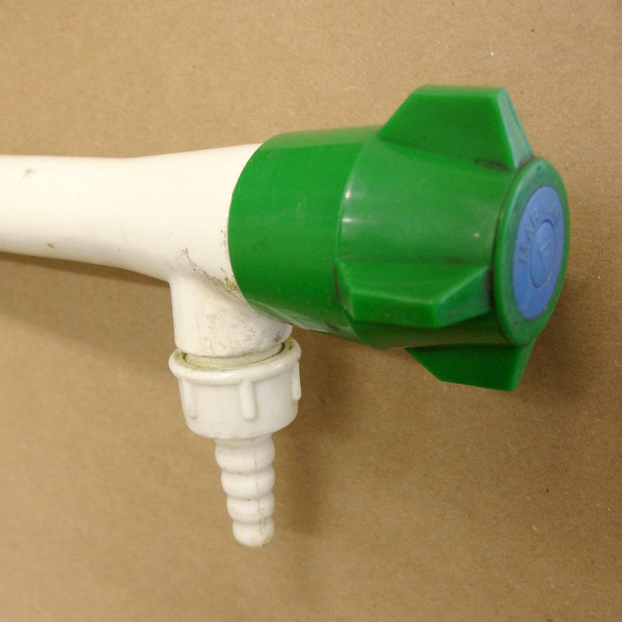 Kran z oliwką laboratoryjną